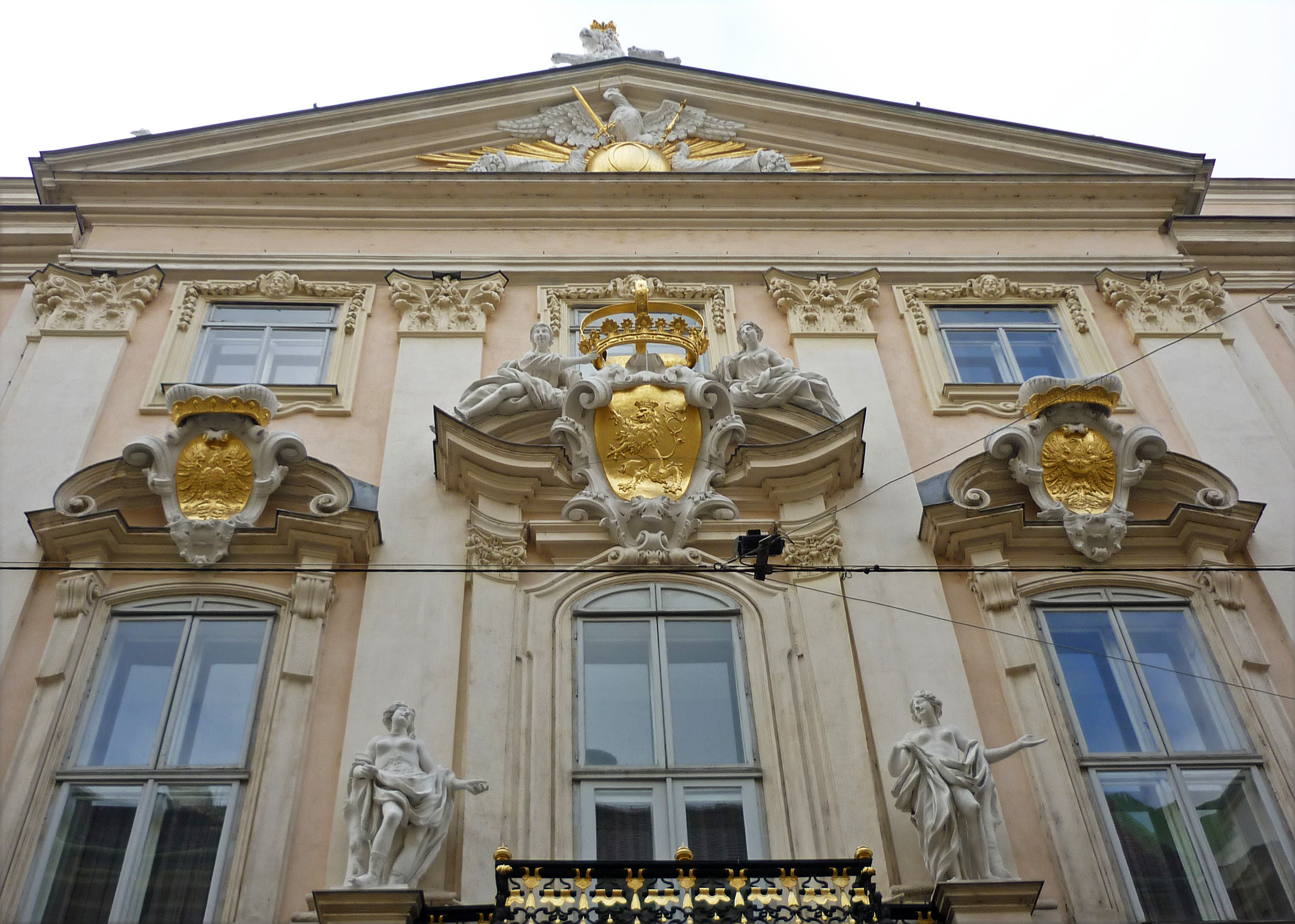 Ehem. Böhmische Hofkanzlei Wien, jetzt Verwaltungsgerichtshof, Wipplingerstraße